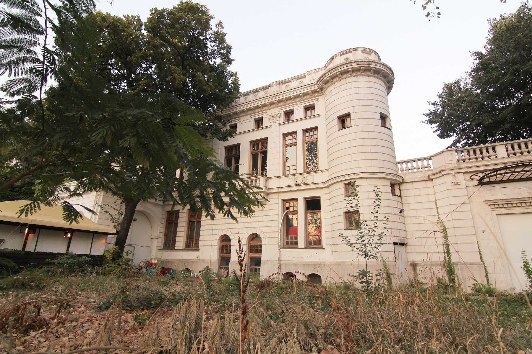 Restaurantul Cina